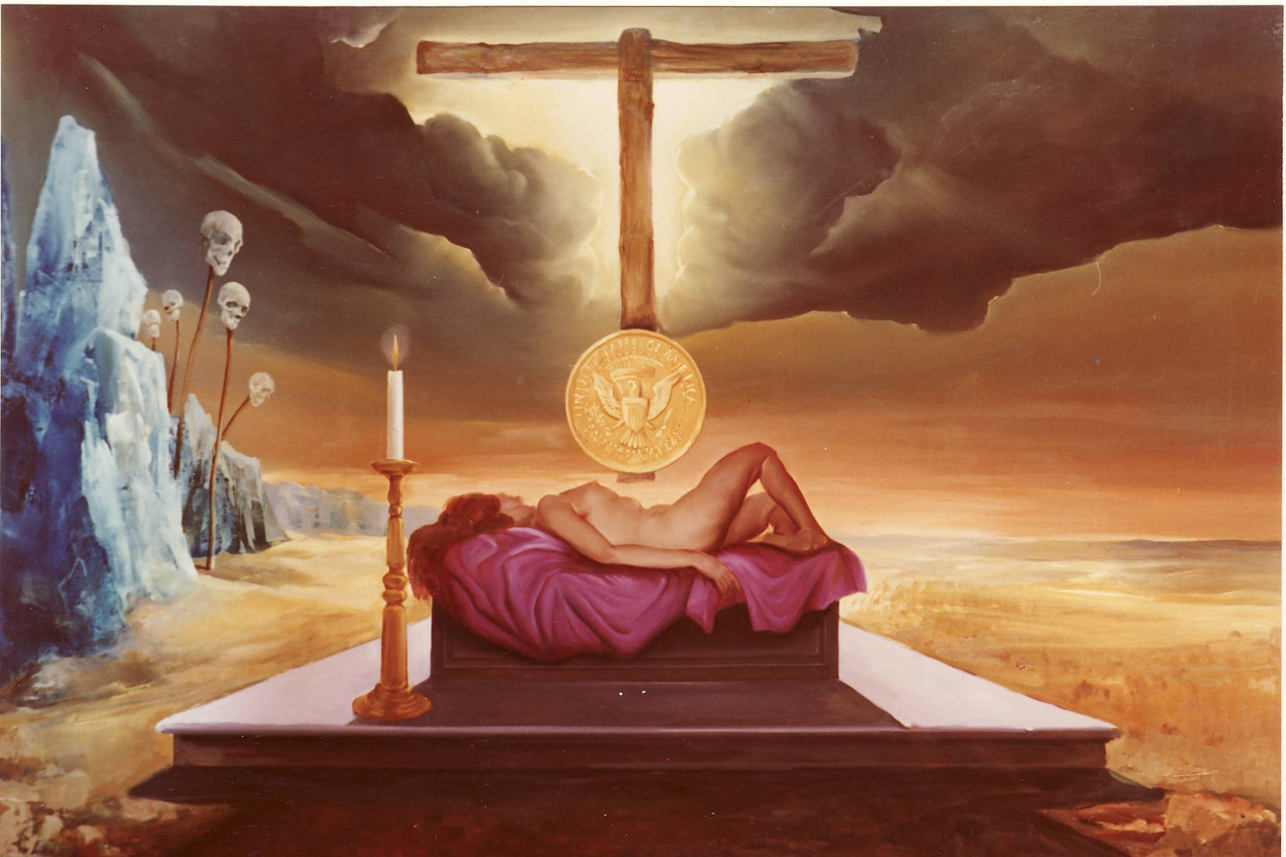 werk van Jos Trotteyn